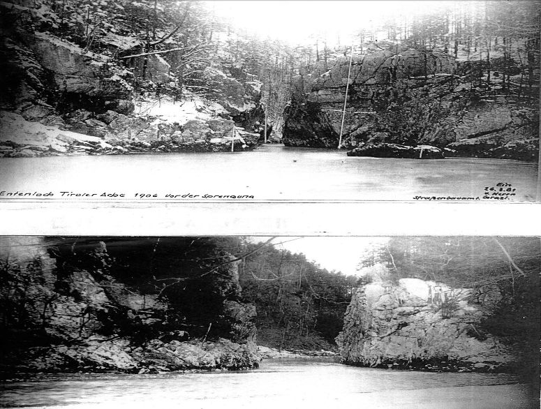 Archivfoto